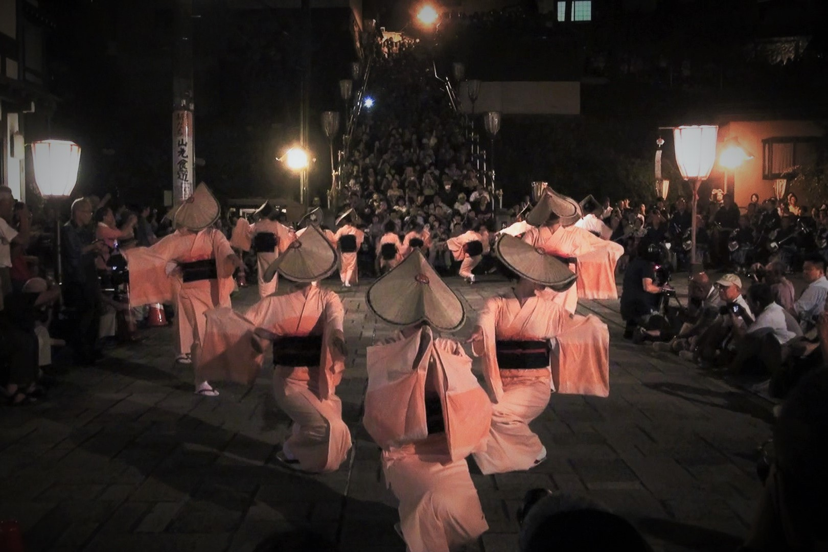 おわら風の盆。鏡町支部おたや階段前。2016年9月3日撮影。